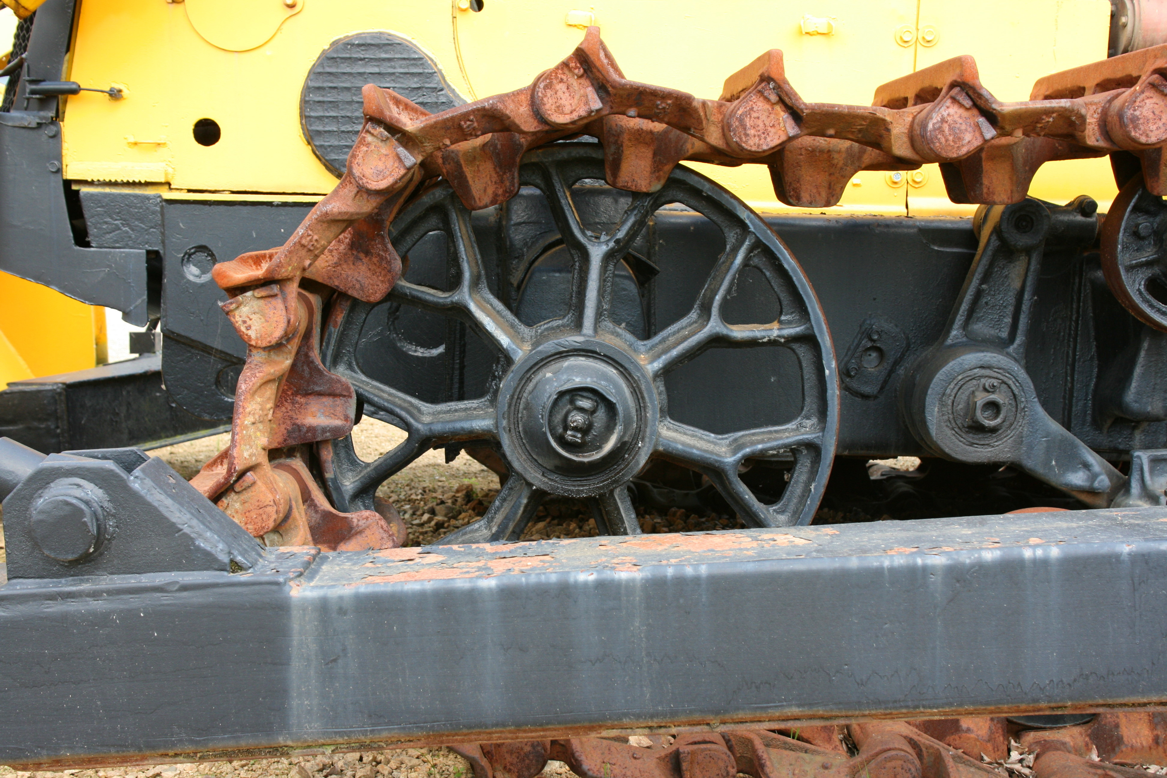 Raupe T 180 G im Museum “Bagger 1452”, Berzdorfer Straße 102 in Görlitz